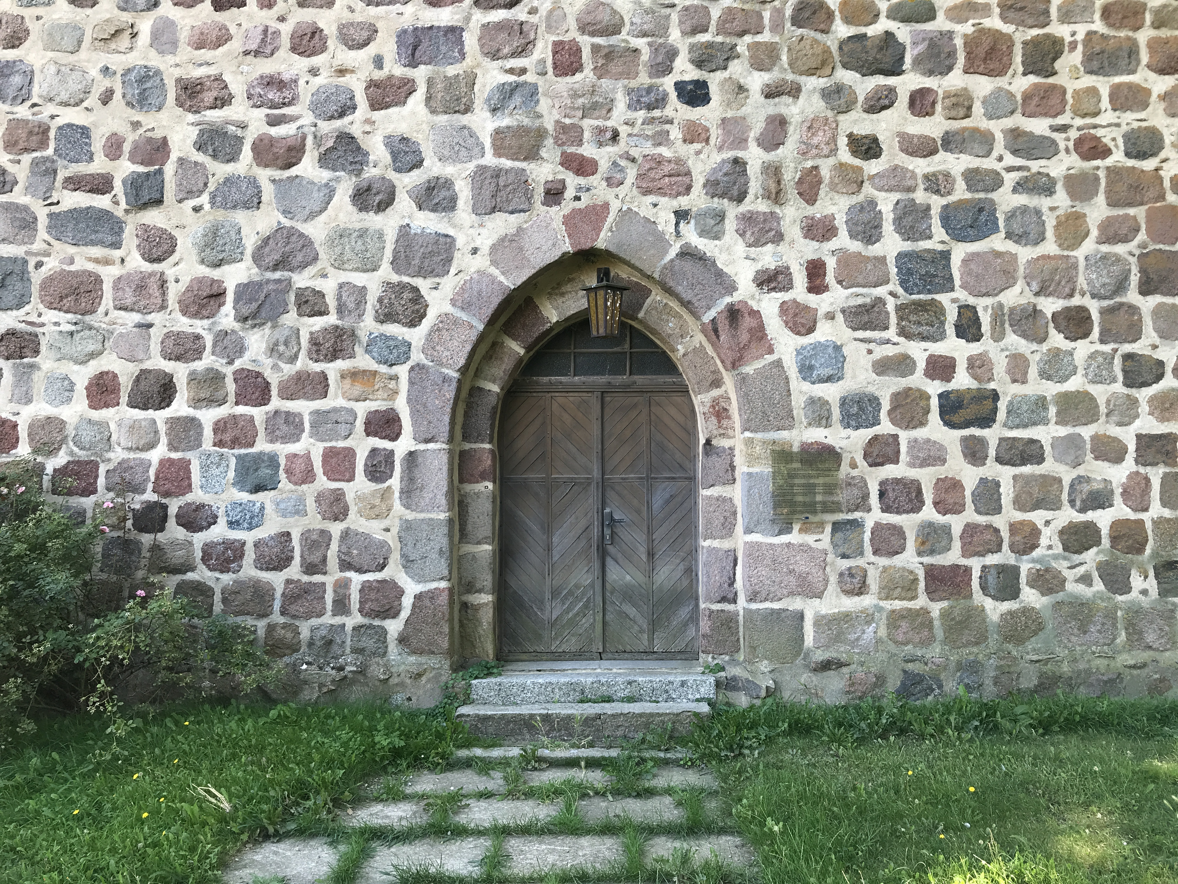 Im Innern steht unter anderem ein Altarretabel aus dem 18. Jahrhundert.